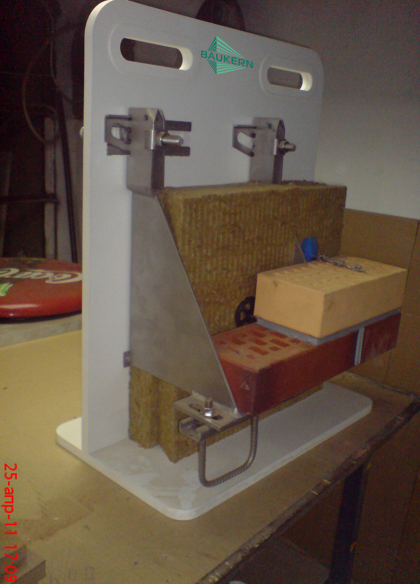 Пример использования кронштейнов Jordahl для крепления облицовки вентфасада